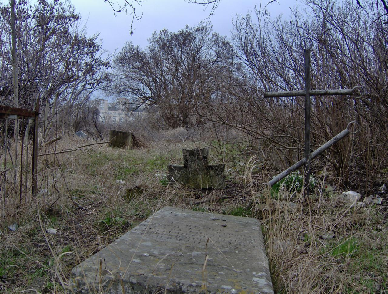 Петровское кладбище, Симферополь, ул. Первомайская